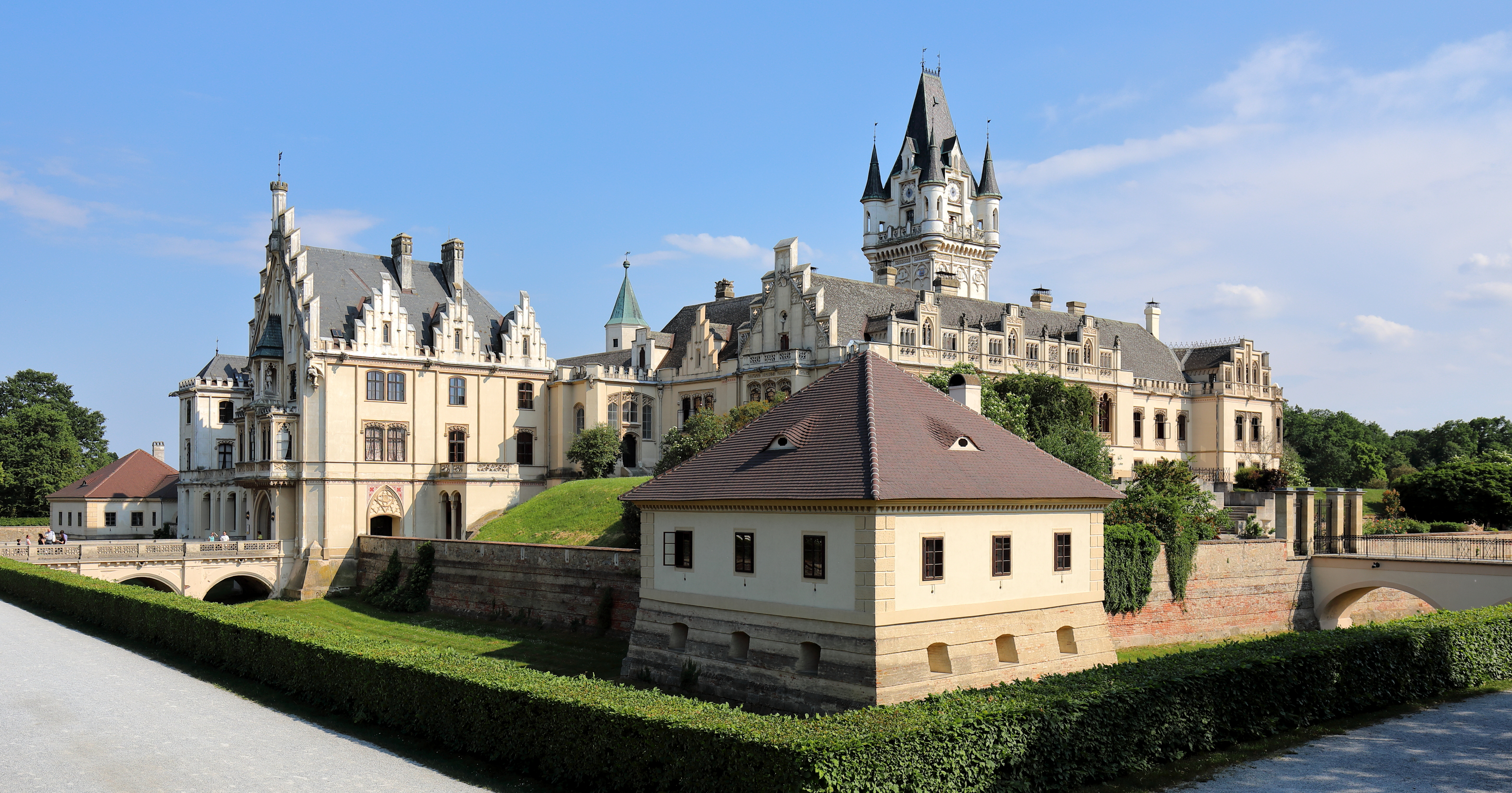 Nordwestansicht des Schlosses Grafenegg in der niederösterreichischen Marktgemeinde Grafenegg.Urkundlich 1294 als Festes Haus mit Mauer und Graben aufscheinend, wurde die Anlage 1645 im Zuge des Dreißigjährigen Krieges durch die Schweden gestürmt. Anschließend erfolgte die Wiederinstandsetzung und der Ausbau zu einer Vierflügelanlage. Von 1845 bis 1872 fand ein weiterer Aus- und Umbau zu einer romantisch-historistischen Schlossanlage statt und das Schloss erhielt dabei im Wesentlichen sein heutiges Erscheinungsbild. Die schweren Schäden infolge von Kriegs- und Nachkriegsereignissen wurden durch eine Restaurierung und Wiederinstandsetzung ab 1967 behoben.